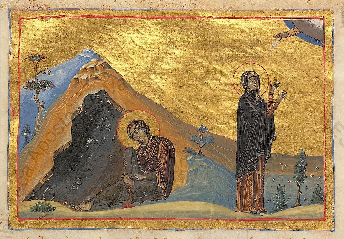 Мученицы Зинаида и Филонилла. Миниа-тюра из Минология Василия II. 976–1025 гг. (Vat. gr. 1613. P. 106)